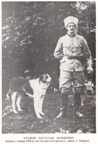 Богуслав Шашкевич - отаман УГА